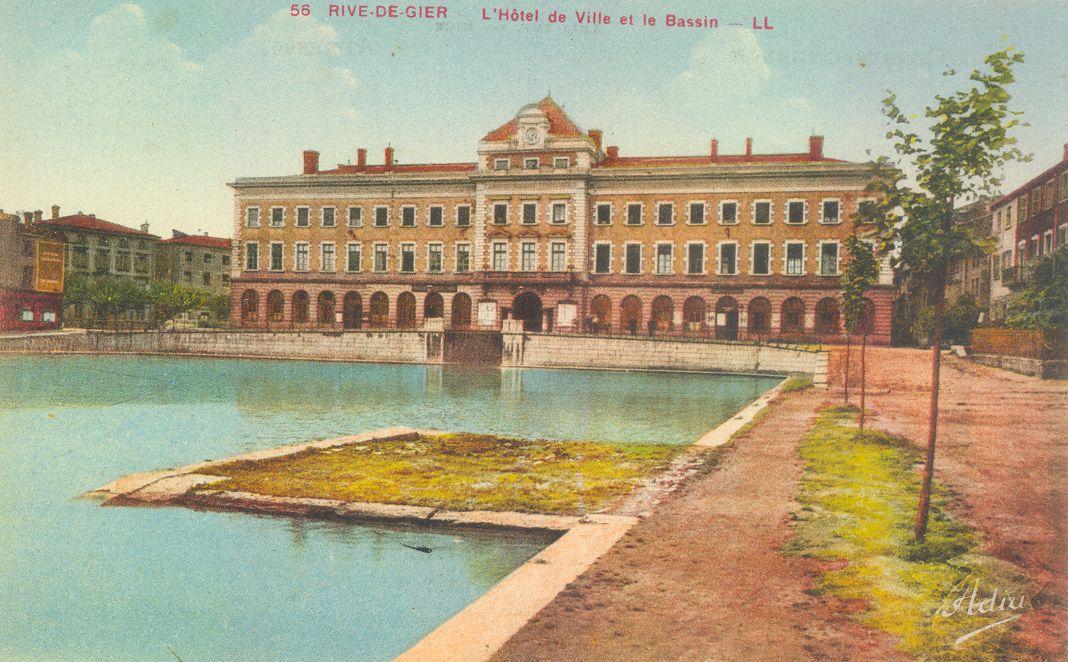 Image couleur de l'hôtel de ville